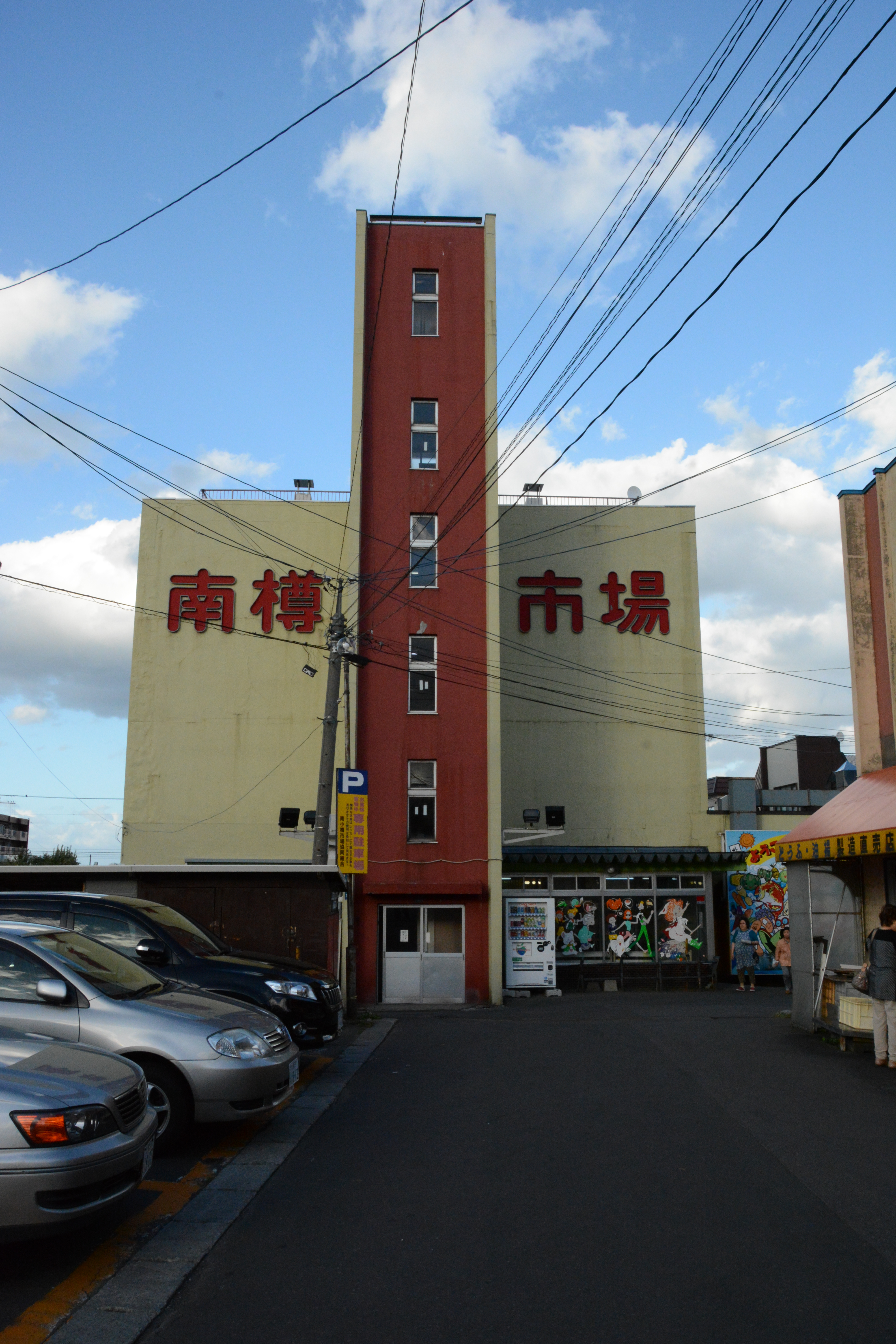 南樽市場外観